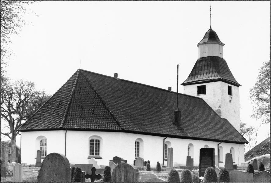 Kyrkan från nordöst. Kategori: (01) ExteriörerKyrkan från nordöst.